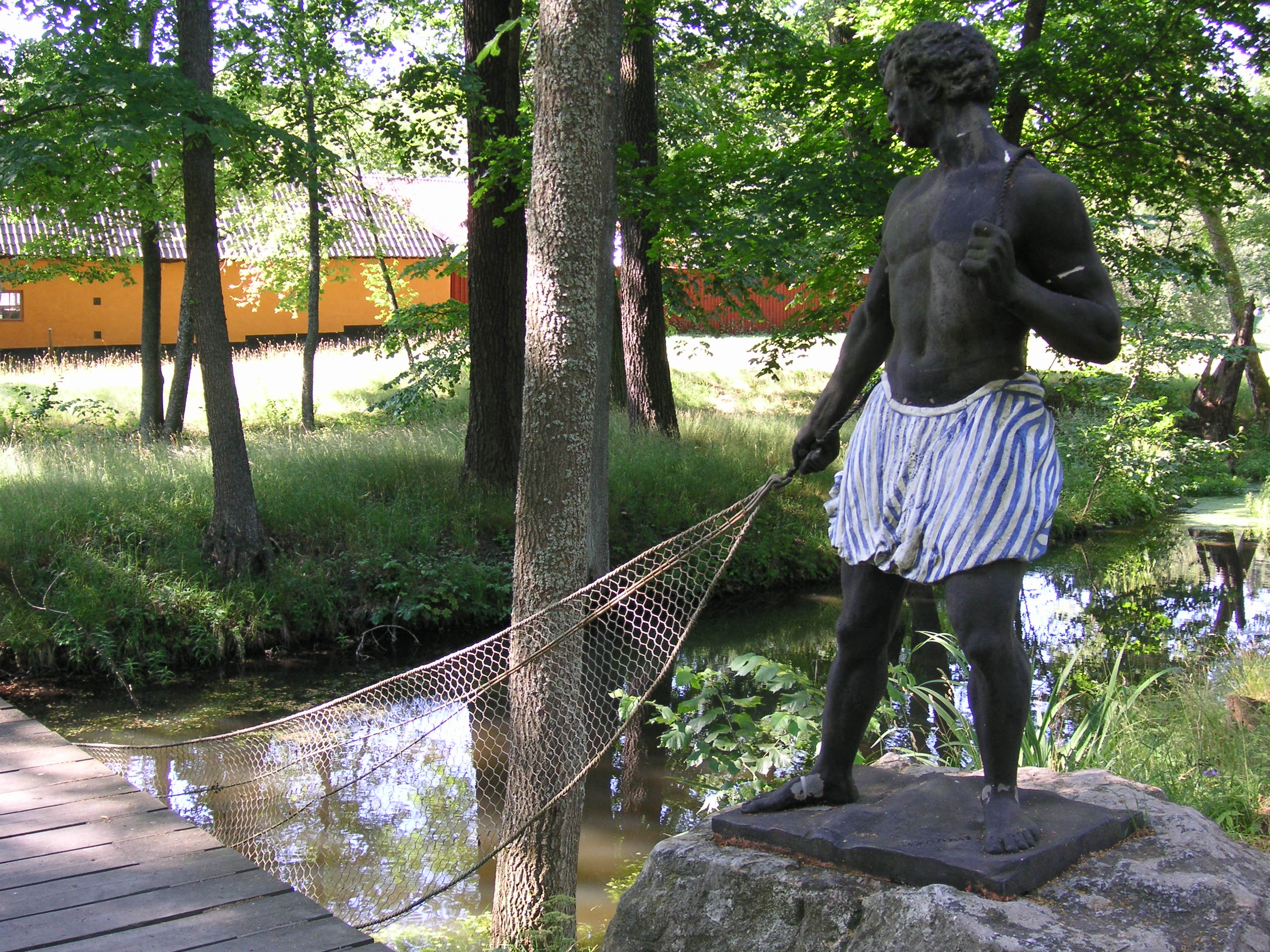 Ulriksdals slott, Netzziehender Mohr